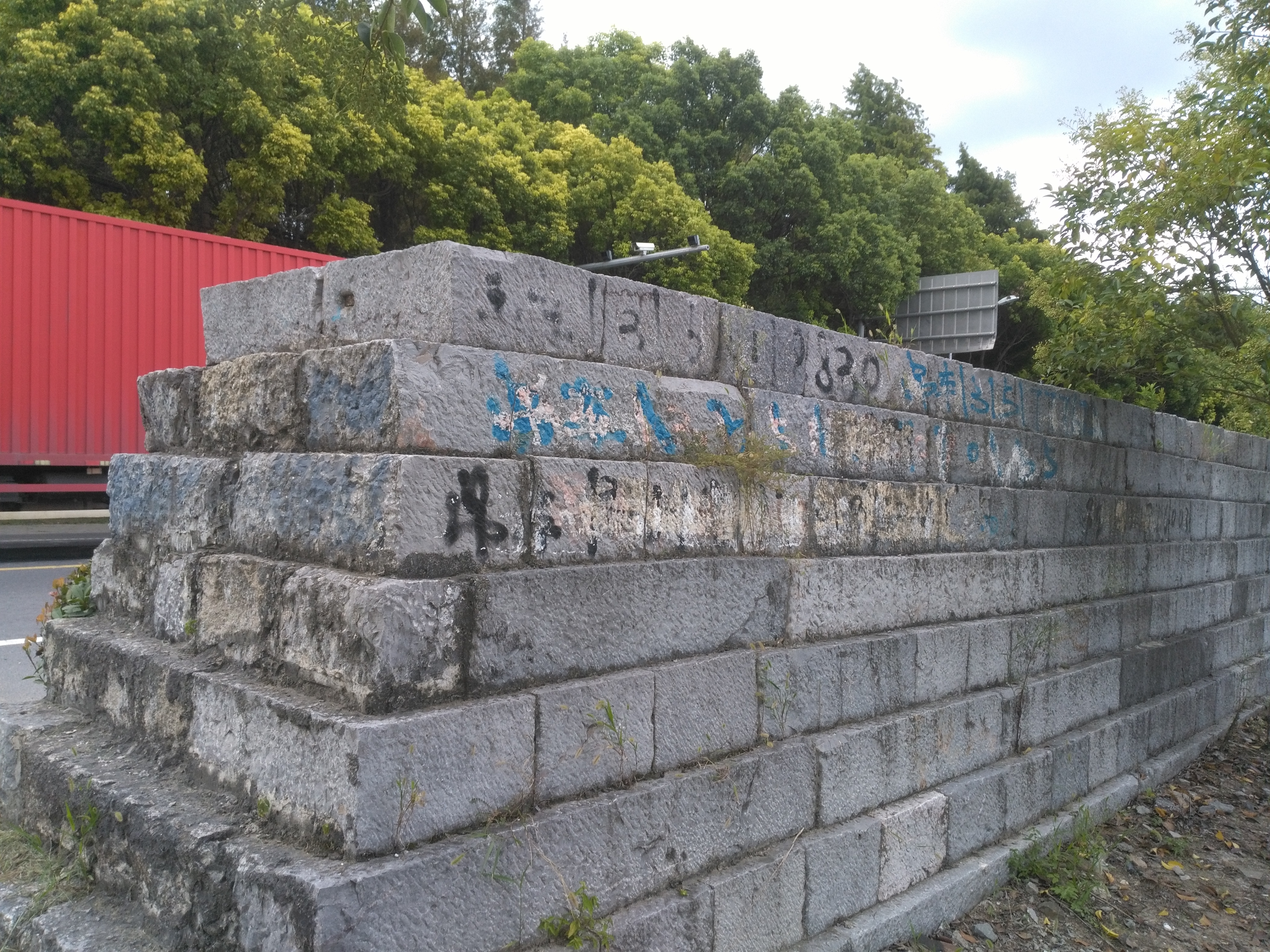 奉贤华亭海塘 柘林镇奉柘公路南侧 清雍正年间(1725～1728年)